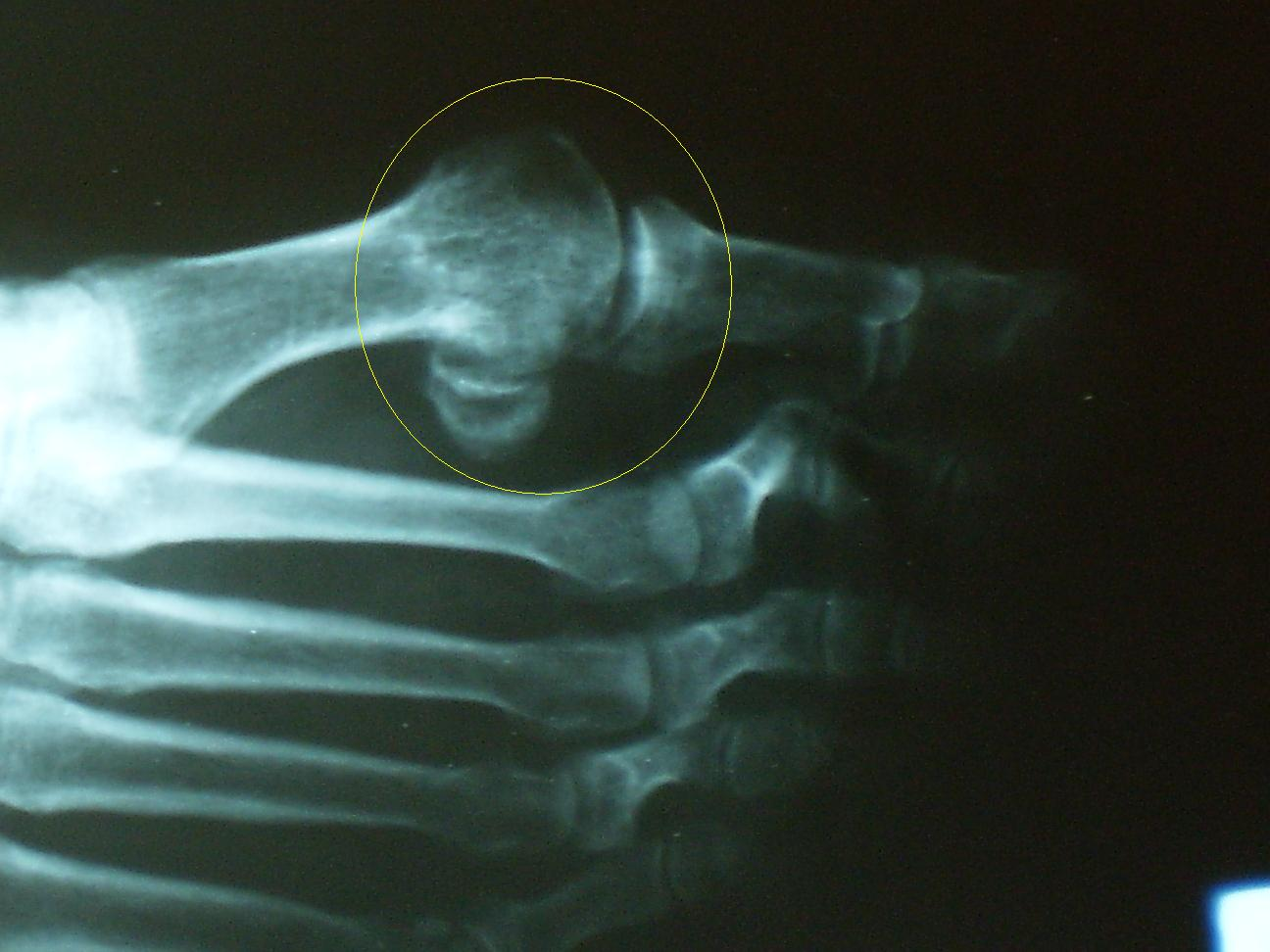 Osteoartritične promene u zglobu palca leve noge (radiogram). Autor: dr Milorad Dimić, Niš, Srbija, 06.12.2011